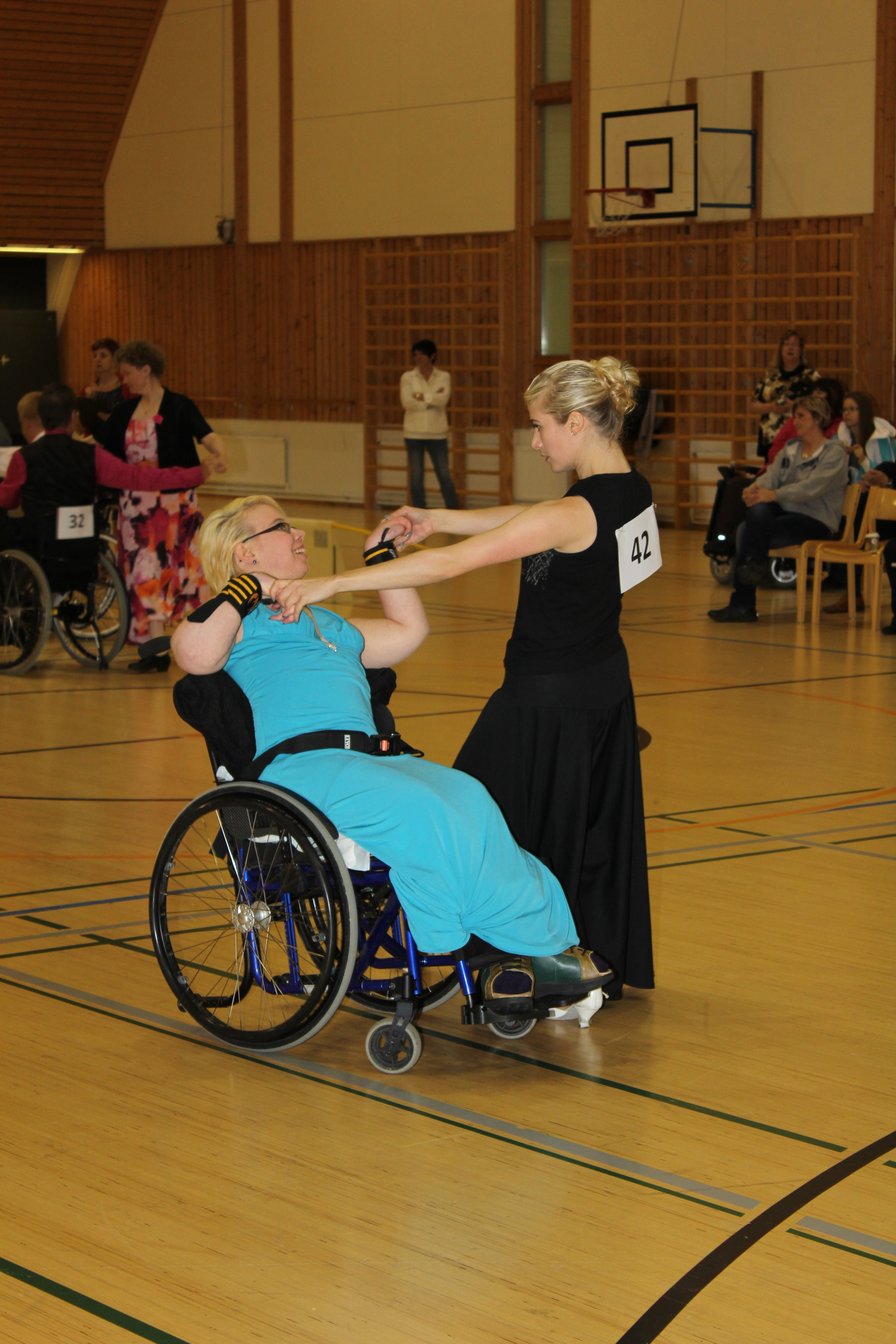 Pyörätuolitanssin SM-kisat Lohjalla 23.9.2012.